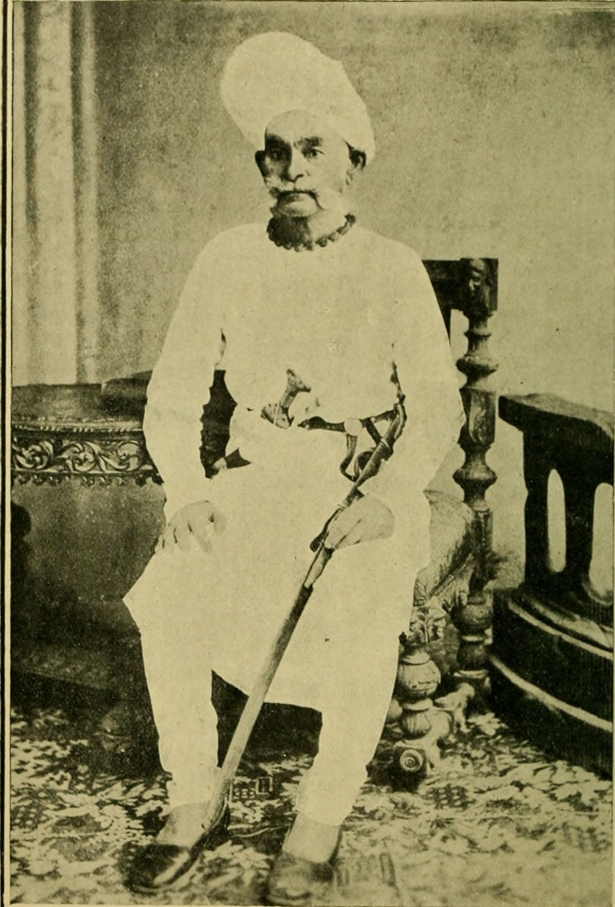 Maharana Vikramjitji of Porbandar State